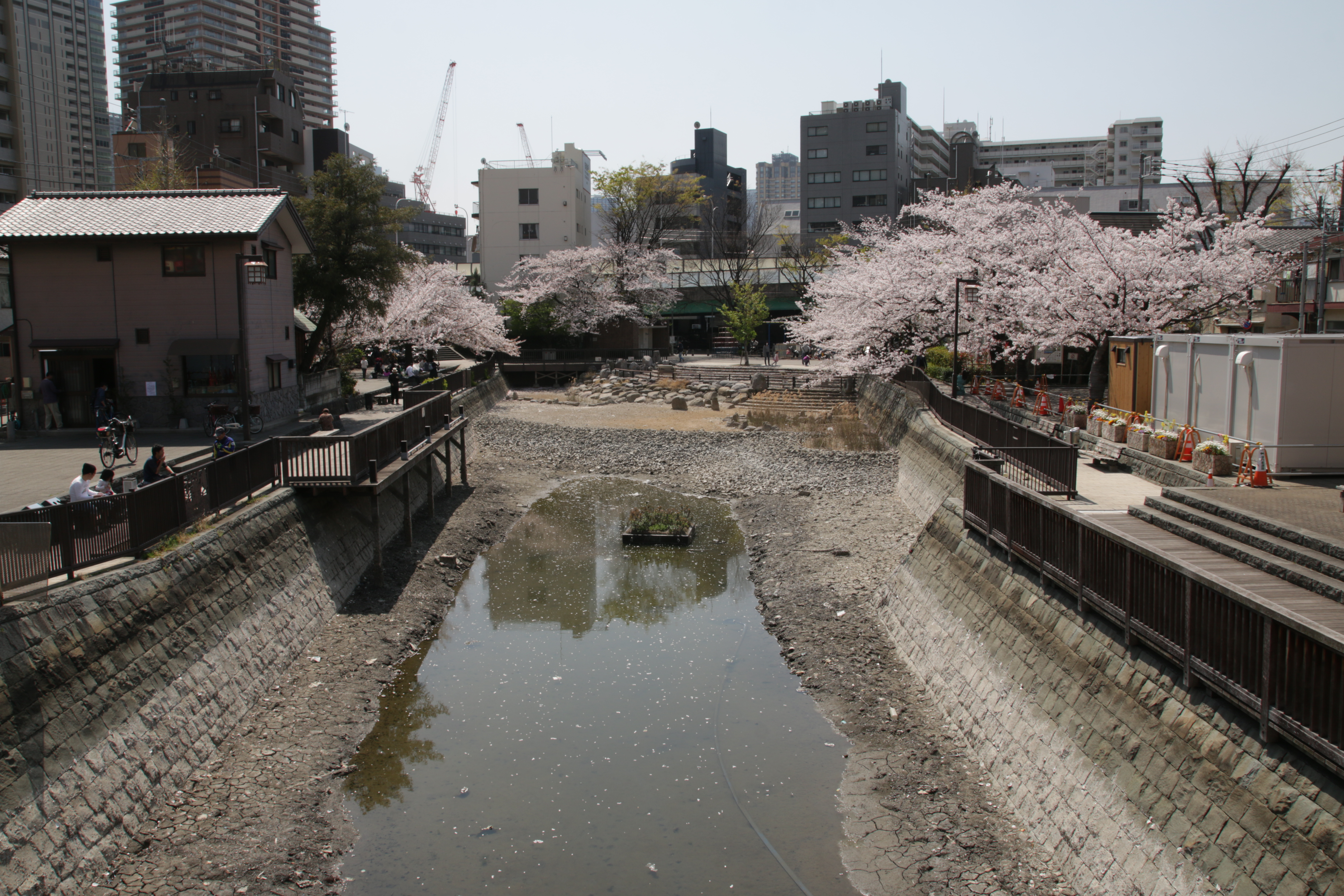 佃小橋から撮影した佃堀。工事中のため水が抜かれている。2019-04-06